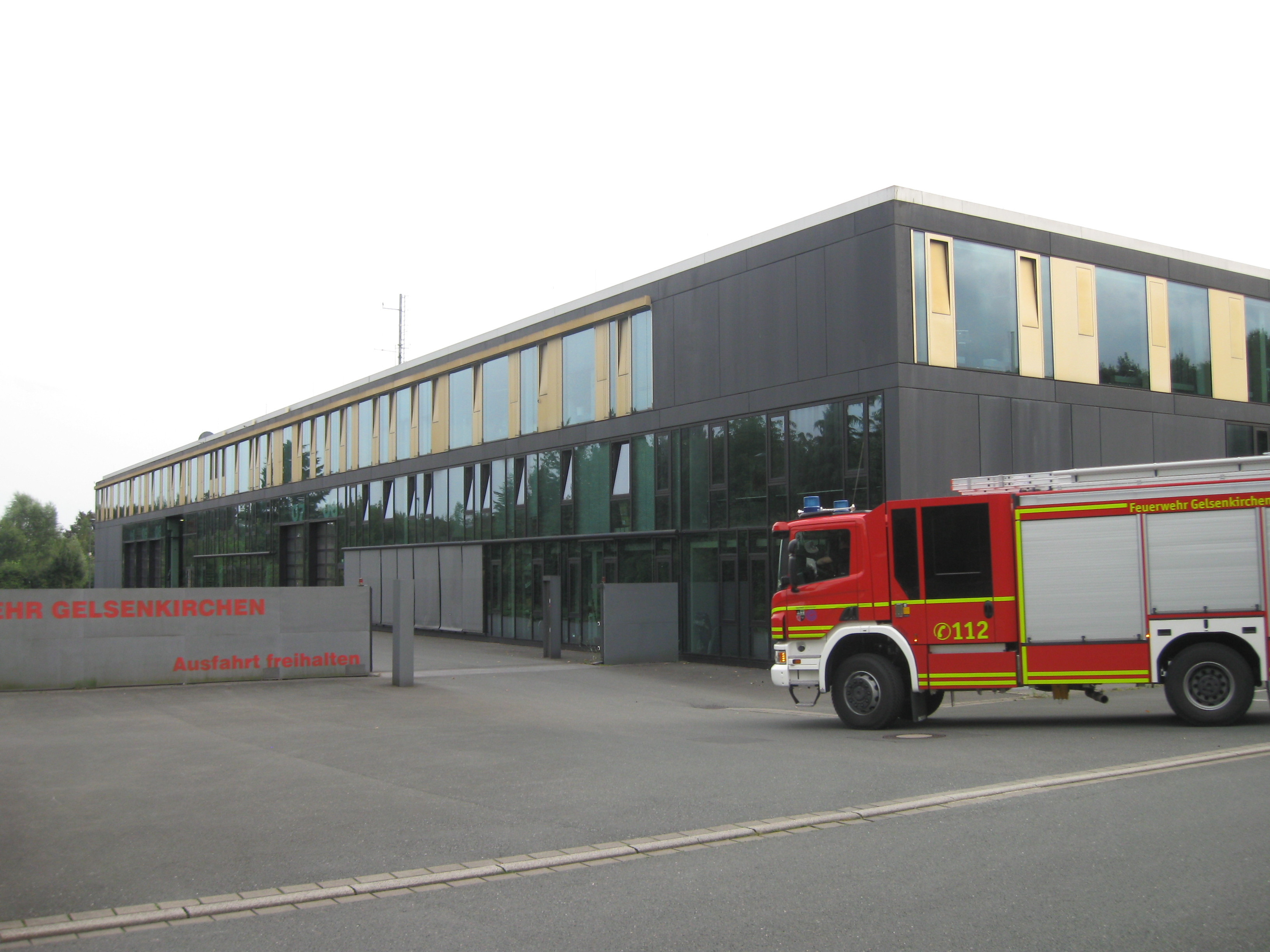 Zentrale Feuer- und Rettungswache 2 (ZFRW Gelsenkirchen) an der Seestraße: aktuelle Gelsenkirchener Hauptfeuerwache (Einweihung 2005). Osttor mit einfahrendem Löschfahrzeug.